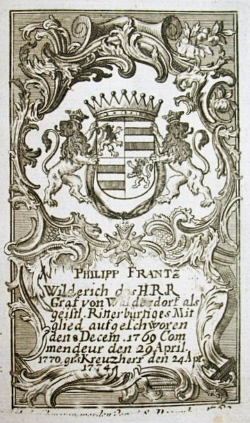 Philipp Franz Wilderich Nepomuk von Walderdorf (+ 1810), Fürstbischof von Speyer, Wappen-Exlibris als bayerischer St. Georgsritter